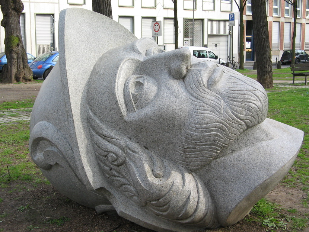 Kopf des Heiligen Gereons vor der romanischen Kirche St. Gereon in Köln, Künstler war Iskender Yediler; der Blick ist mahnend auf die Kirche gerichtet; der Kopf ist 8 Tonnen schwer und kostete 50 000 Euro; hier sollen 304 n. Chr. die Römer den Offizier Gereon und weitere 316 Mann seiner Legion enthauptet haben, weil er sich zum Christentum bekannte